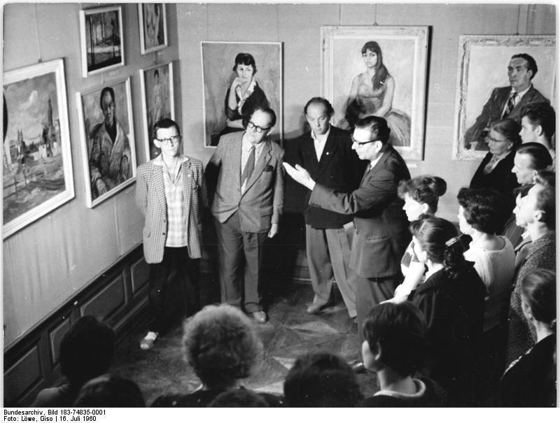 Koritzburg, Kunstausstellung in Dorfakademie Zentralbild Löwe 16.7.1960 Junge Künstler zeigen Arbeiten in Dorfakademie. Die Hochschule für bildende Künstler Dresden legte vor den Einwohnern von Koritzburg bei Dresden über ihre Ausbildungs- und Lehrprogramm Rechenschaft ab. Sie zeigte im Rahmen der Dorfakademie in einer kleinen Ausstellung Studien und Skizzen aus dem 4. und 5. Studienjahr der Absolventen Werner Haselhuhn, Gottfried Sommer und Viktor Schlötzer. Die drei Absolventen, die während ihres Studiums Mitglieder einer Komplexbrigade im Edelstahlwerk Freital waren und ihre Diplom-Arbeit aus diesem Milieu geschaffen hatten, werden in den nächsten Tagen mit dem Werk einen Arbeitsvertrag abschliessen. UBz: Der Rektor der Hochschule Prof. Paul Michaelis spricht zu den erschienenen Gästen über den Ausbildungsweg der jungen Künstler an der Hochschule.